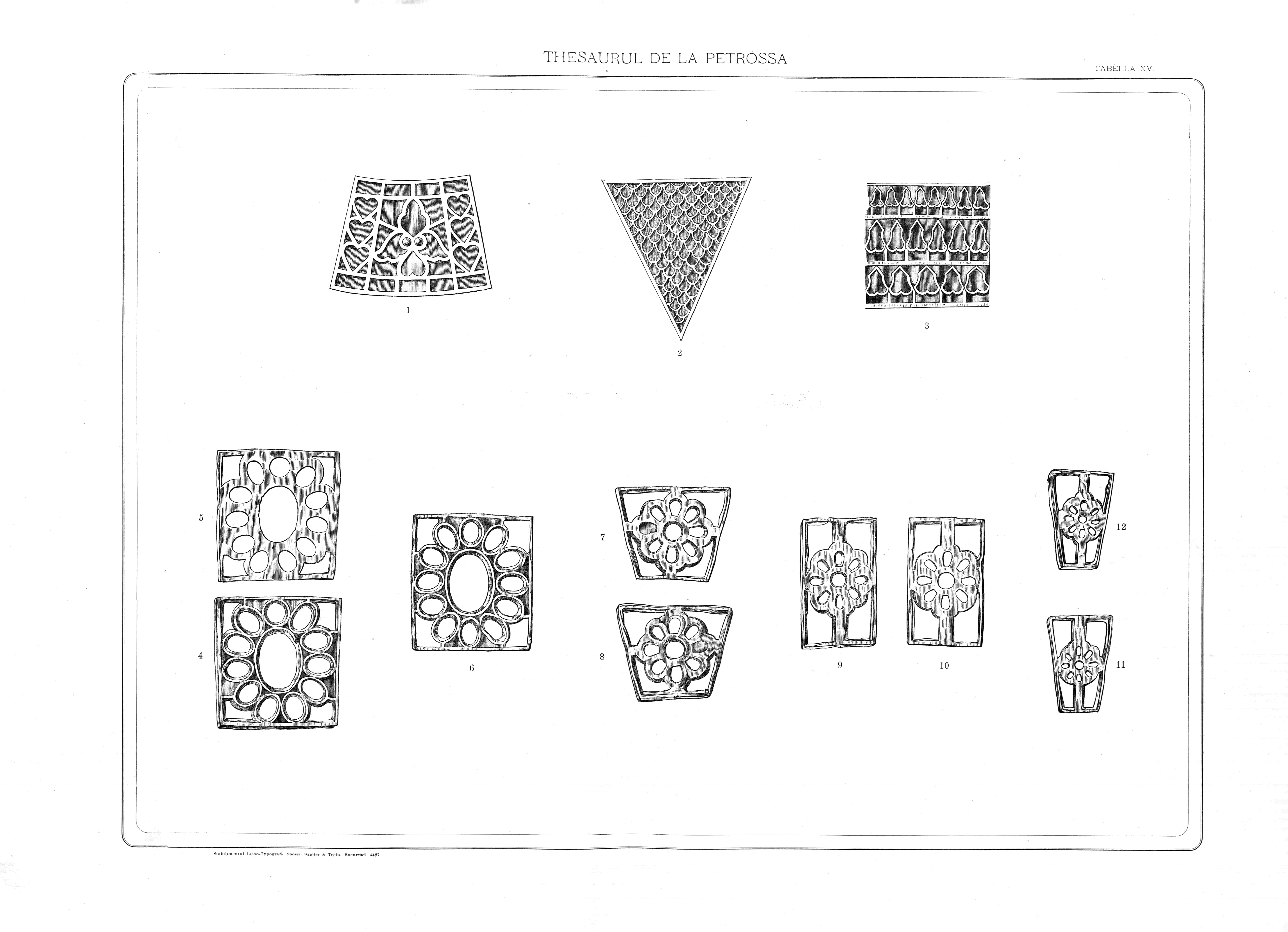 Detalii ale panerașelor